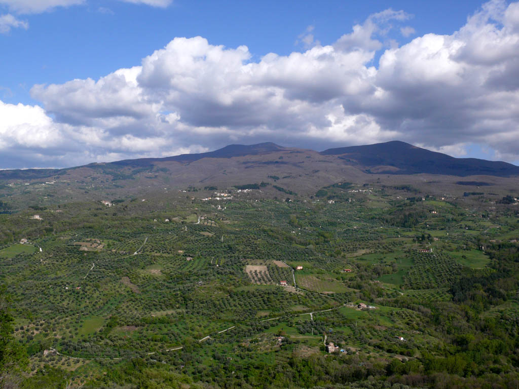 Monte Amiata, seen von Montegiovi